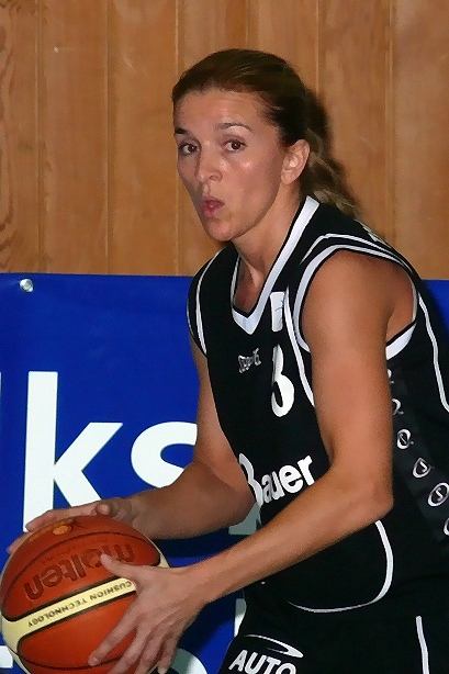 Diana Pop, rumänische Basketball-Nationalspielerin